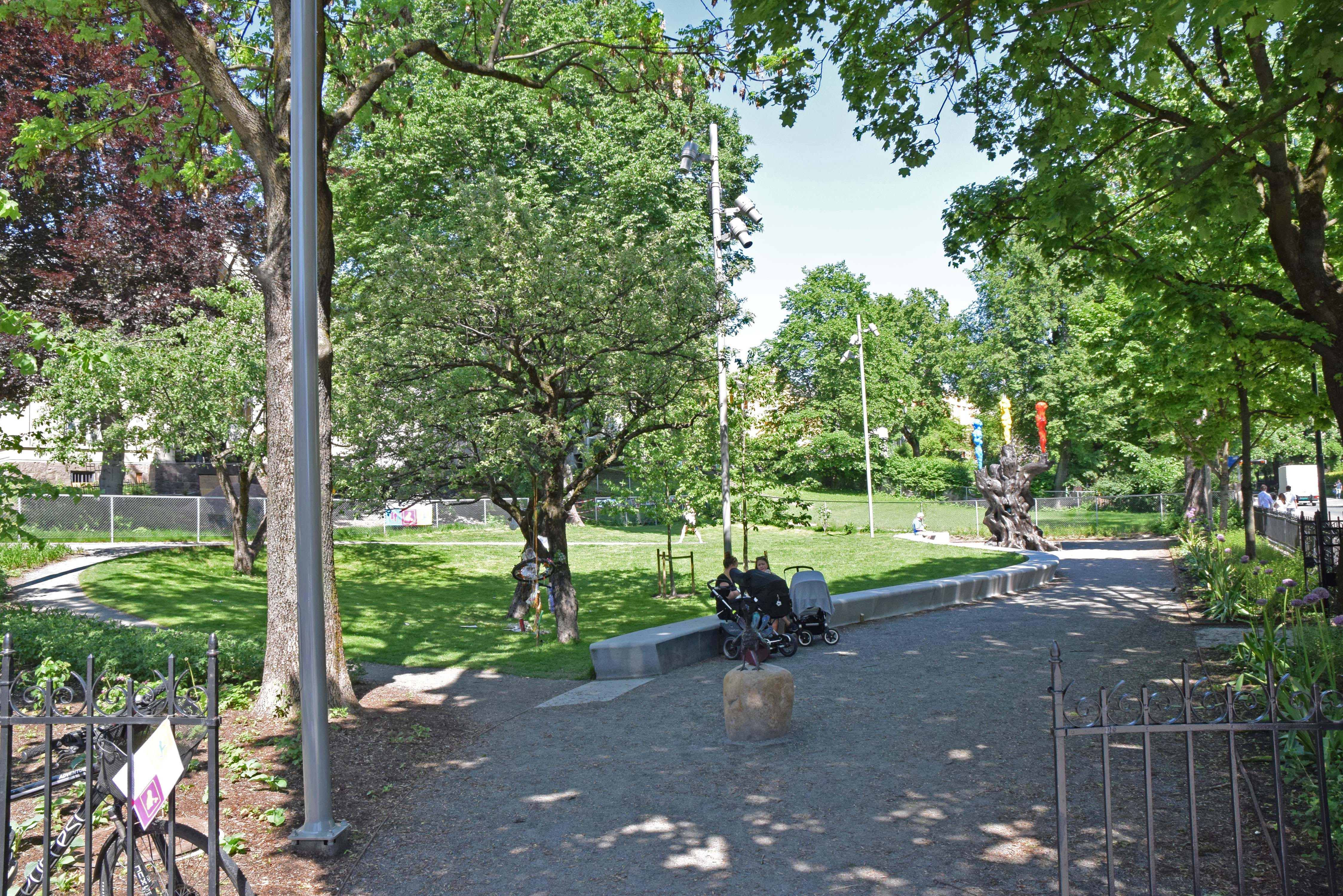 Josefines park, Homansbyen, Oslo, sett fra porten i gatekrysset Hegdehaugsveien/Josefines gate